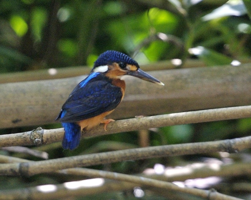 Blue-eared Kingfisher Alcedo meninting Indonesian: Menintin, Raja udang belau, Raja udang meninting, Raja-udang meninting Bogor Botanic Garden, Bogor, Java, Indonesia 20th. October 2008 690V4284